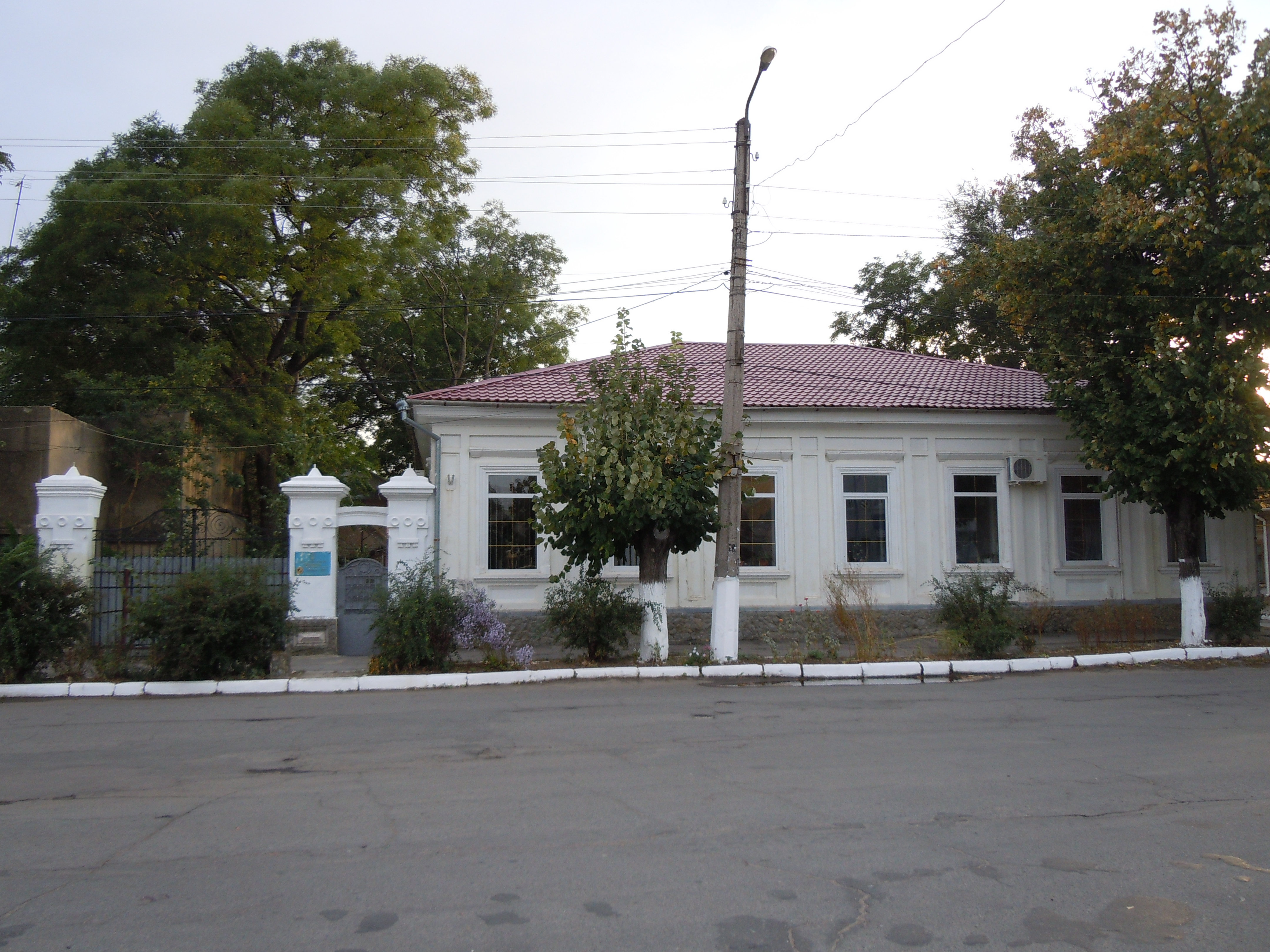 Старий будинок на площі Свободи в Рені